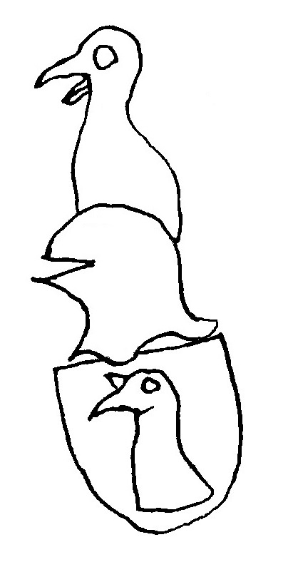 Erb Jana Parduse z Vratkova. Podle Augusta Sedláčka překreslil a upravil Jan Boukal.